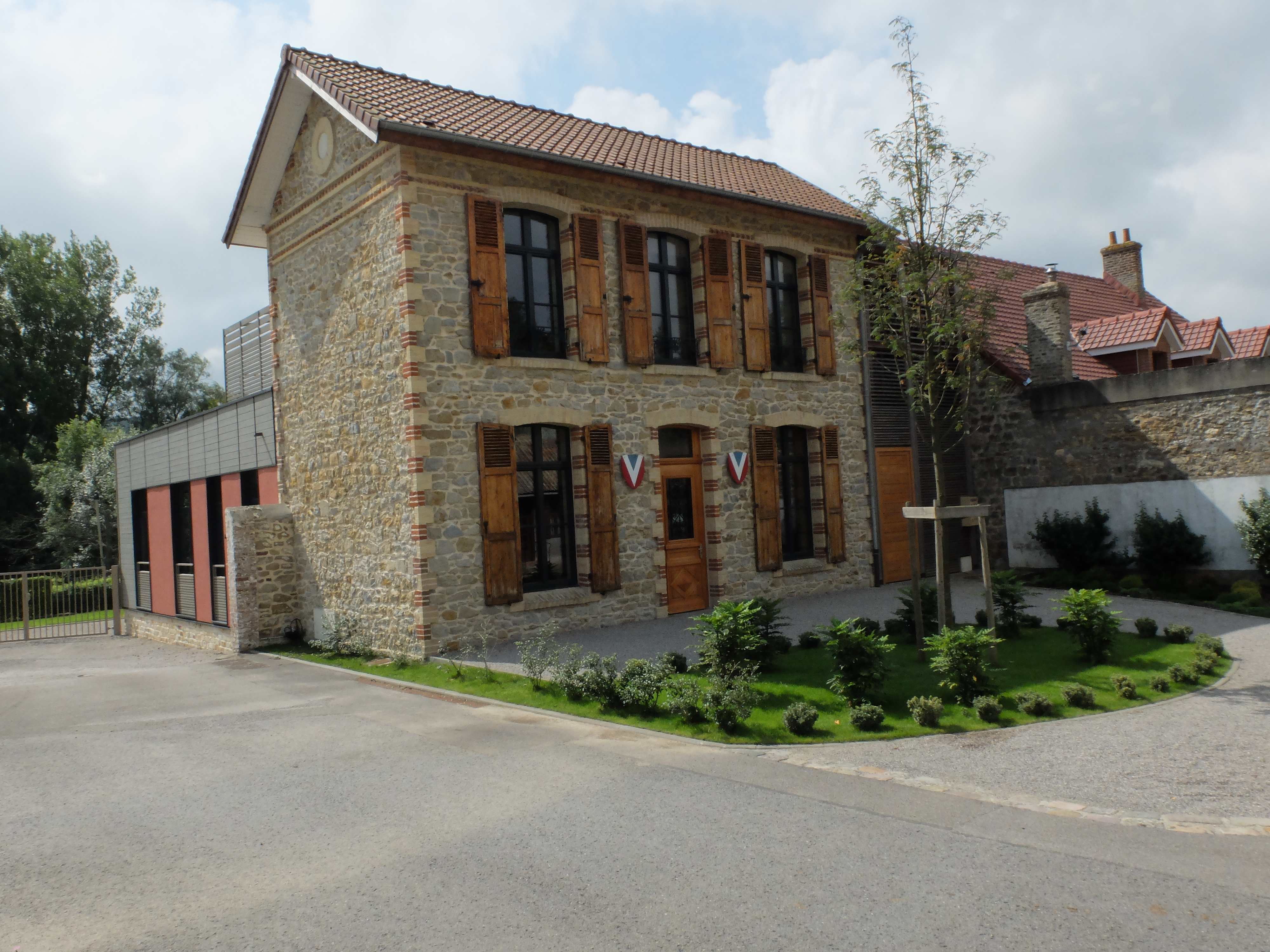 Vue de la mairie d'Echinghen.